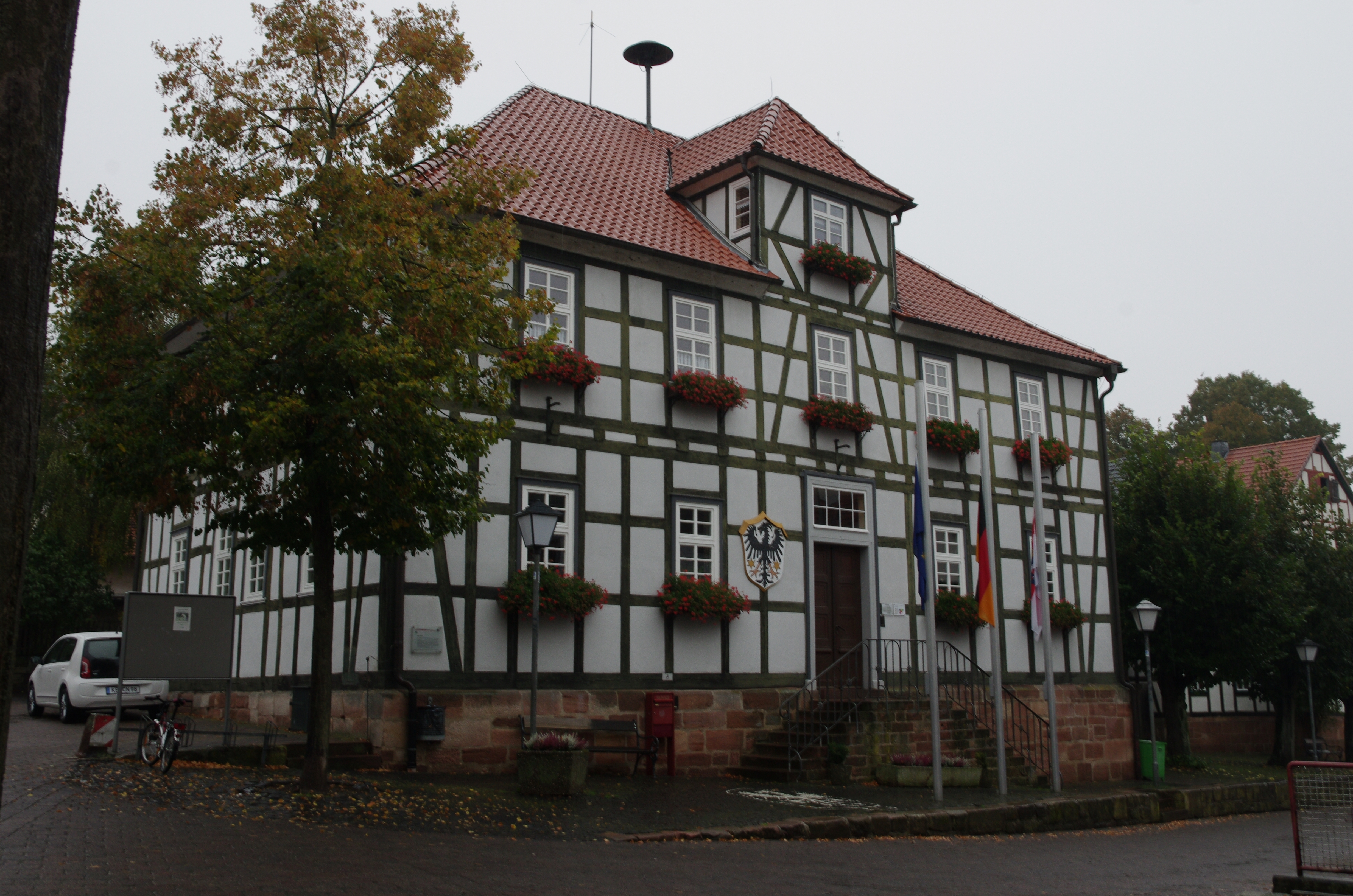 Gemünden (Wohra) in Hessen. Das Rathaus in Gemünden wurde 1824 an Stelle eines Vorgängerbaues erbaut.